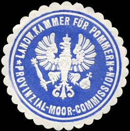 Sealing stamp Title: Landwirtschafts Kammer für Pommern - Provinzial - Moor - Commission Description: blau, weiß, geprägt Place: Stettin size: 4 cm